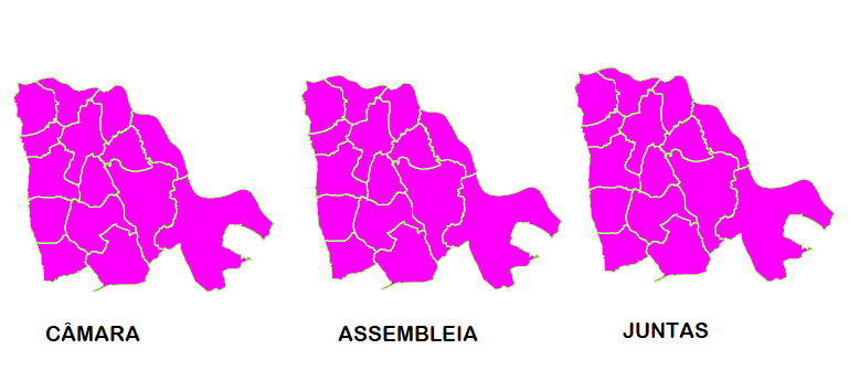 Mapa ilustrativo do partido mais votado por freguesia em Vila Nova de Gaia (2017)